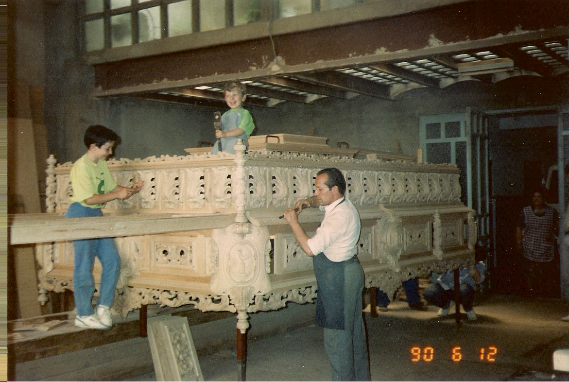 En España, la ebanisteria ha tenido un gran desarrollo en torno a la imagineria religiosa y los pasos procesionales.